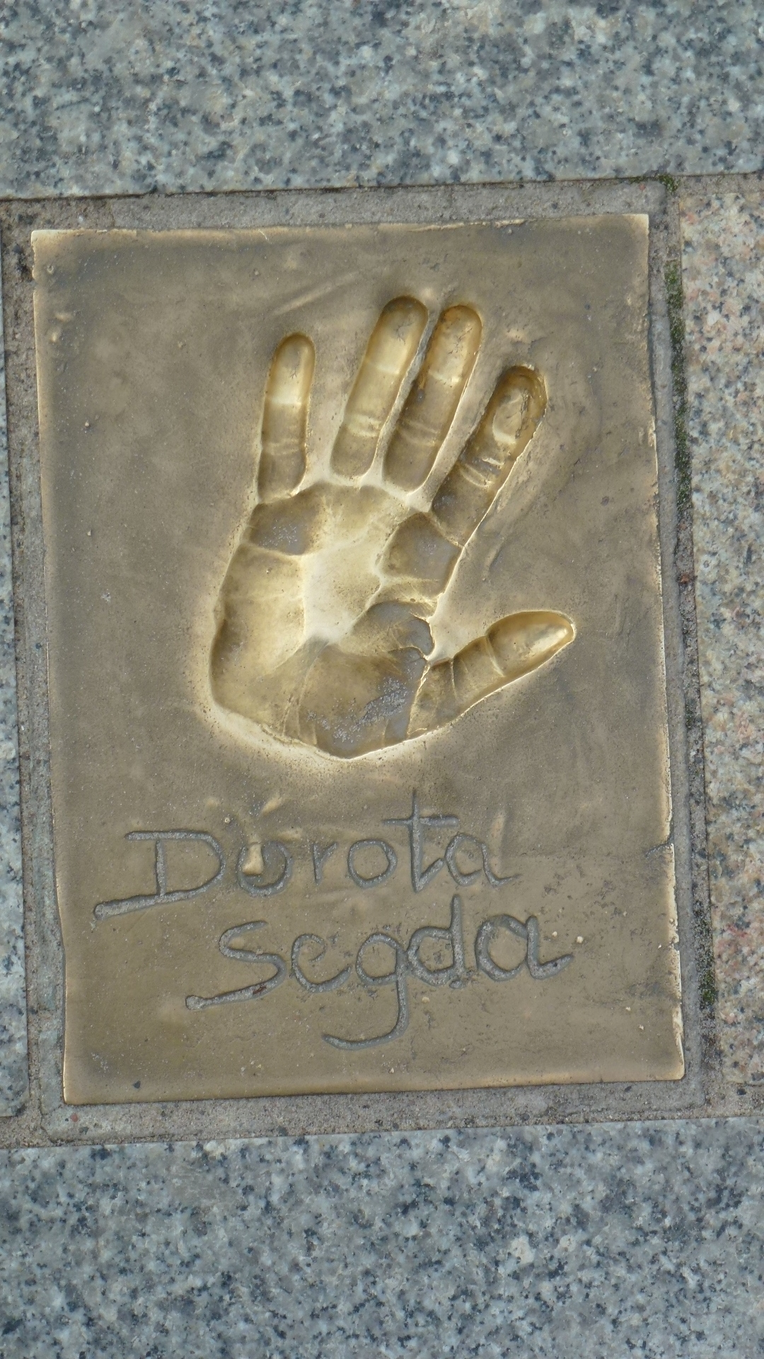 Odcisk gwiazdy na ul. Aleji Gwiazd w Międzyzdrojach woj. zachodniopomorskie pow. kamieński